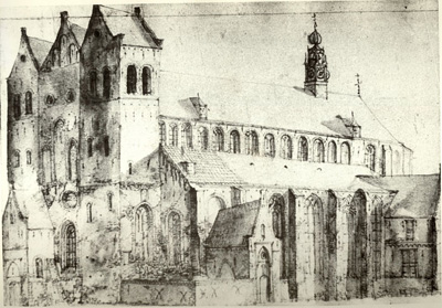 Martinikerk in Sneek, voor 1681, want dan storten de torens in